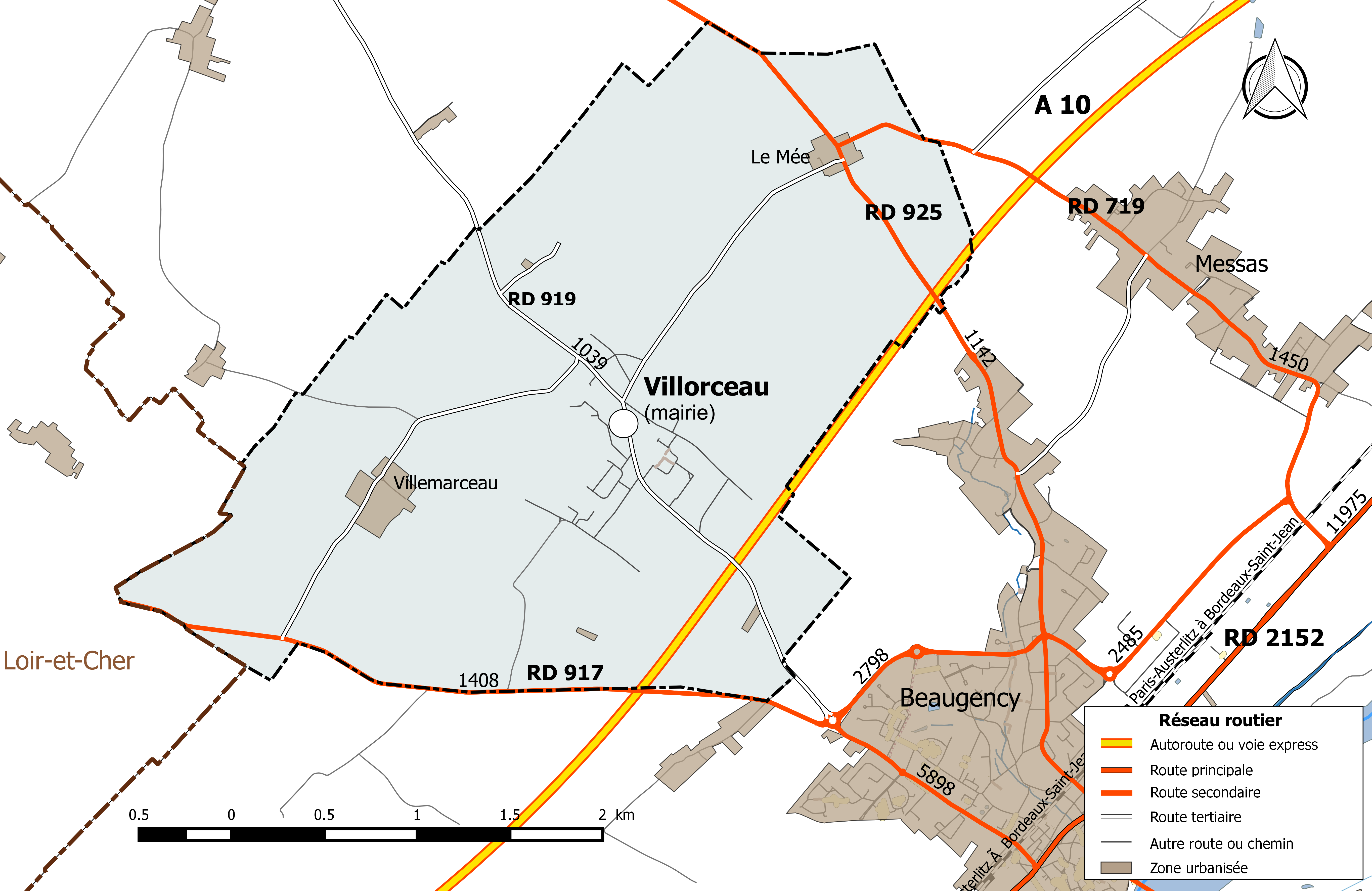 Carte du réseau routier de la commune de Villorceau.